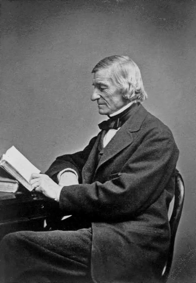 ويليام بارتون روجرس.